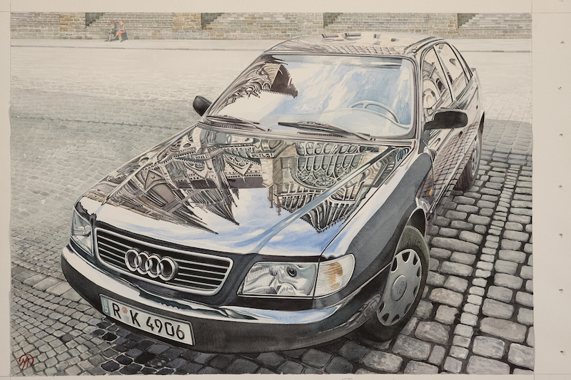 Üperrealistisches Gemälde Spiegelung des Doms zu Regensburg auf einer Autokarosserie.